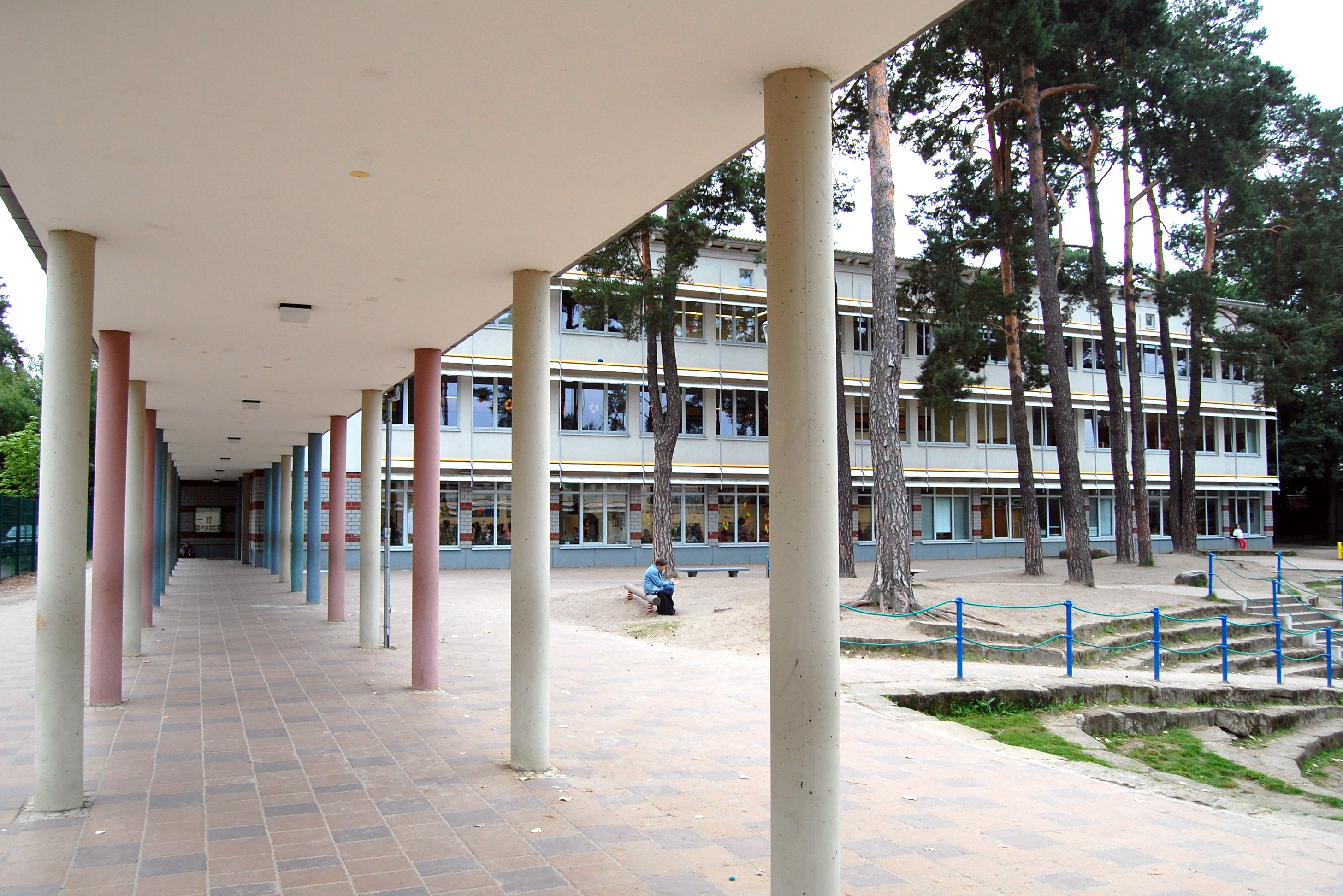 Gebäude B der Waldgrundschule Hohen Neuendorf in Brandenburg/Deutschland, im Vordergrund: Schulhof und verbindender Säulengang zwischen Gebäude A und B